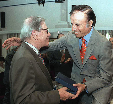 El presidente Menem inauguró la muestra del artista plástico Leopoldo Presas.